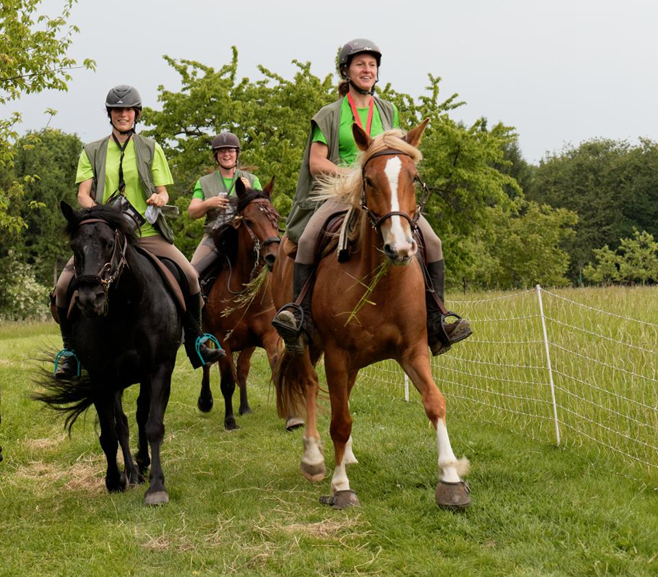 Arrivée du POR en Equipe